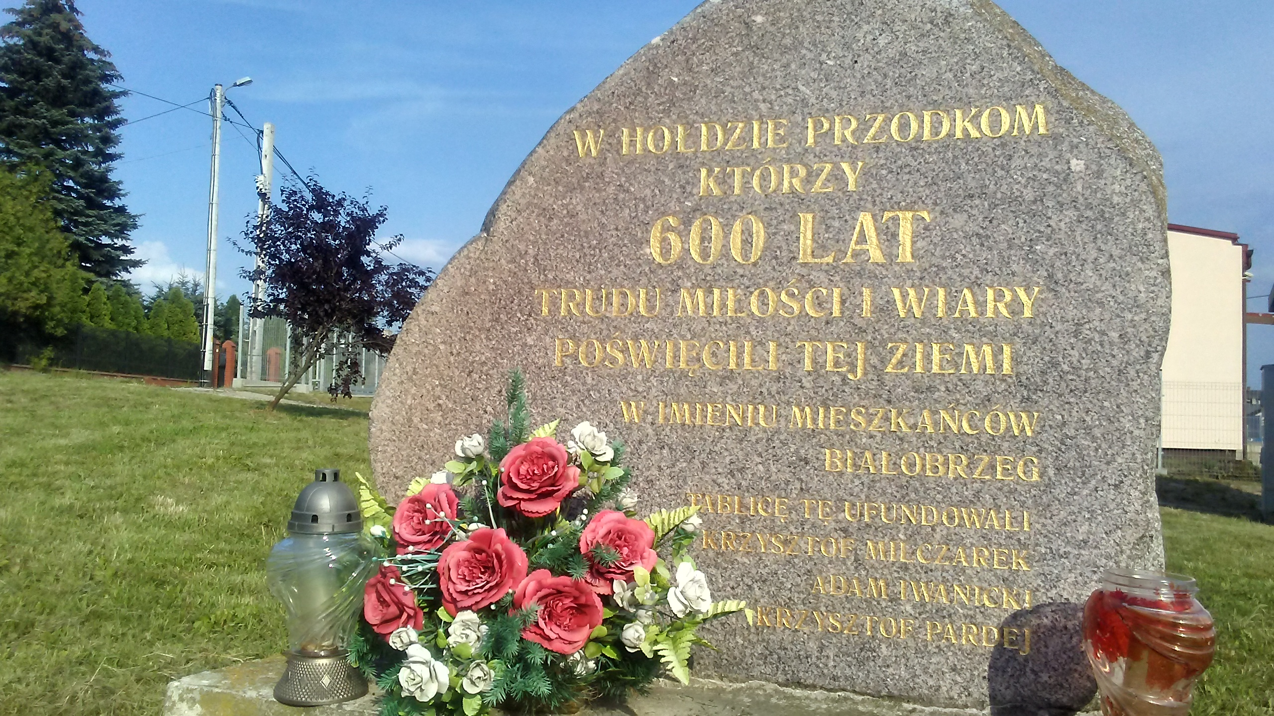 Głaz upamiętniający 600–lecie Białobrzeg (obecnie dzielnica Tomaszowa Mazowieckiego)